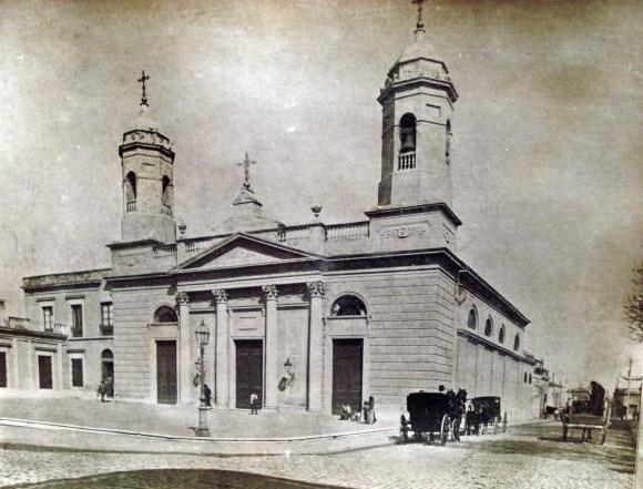 Fachada y atrio de la Basílica del Socorro en Buenos Aires.